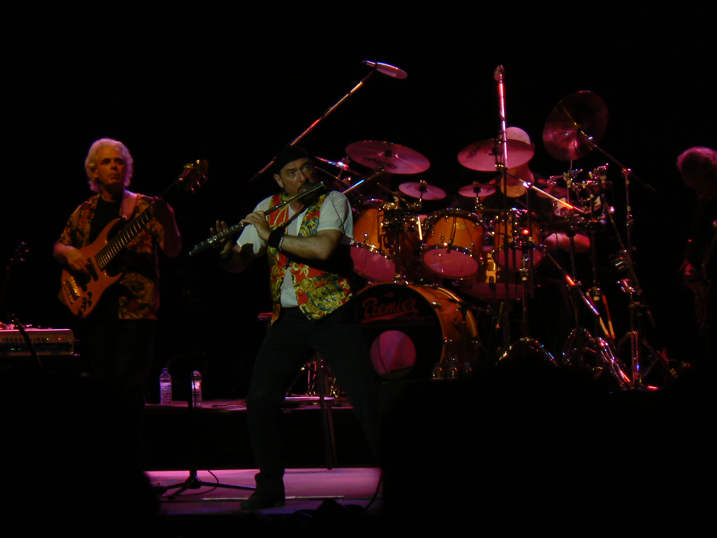 Jethro Tull en concert à Forest National (Bruxelles) en Belgique le 01 juin 2007